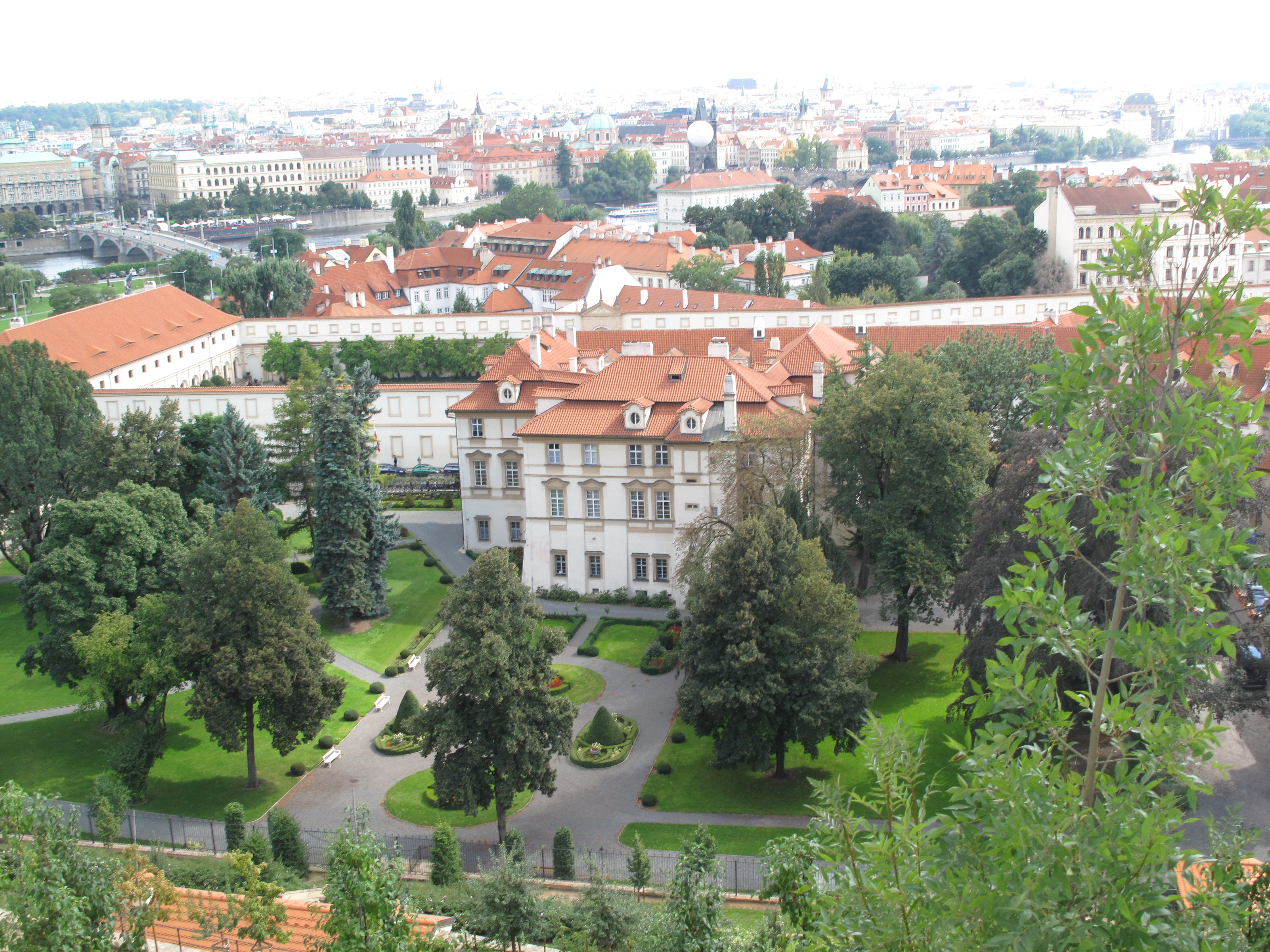 Výhled od Pražského hradu